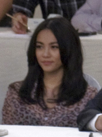 นายกรัฐมนตรีร่วมรับโทรศัพท์ผู้บริจาคเงินและสิ่งของในรายการ "ราษฏ์ รัฐ รวมใจ ช่วยภัยน้ำท่วม" ณ ช่อง 9 อสมท. วันพฤหัสบดี ที่ 21 ตุลาคม พ.ศ.2553 (Photographer attached to the Prime Minister of the Kingdom of Thailand : Peerapat Wimolrungkarat / พีรพัฒน์ วิมลรังครัตน์) @is50mm